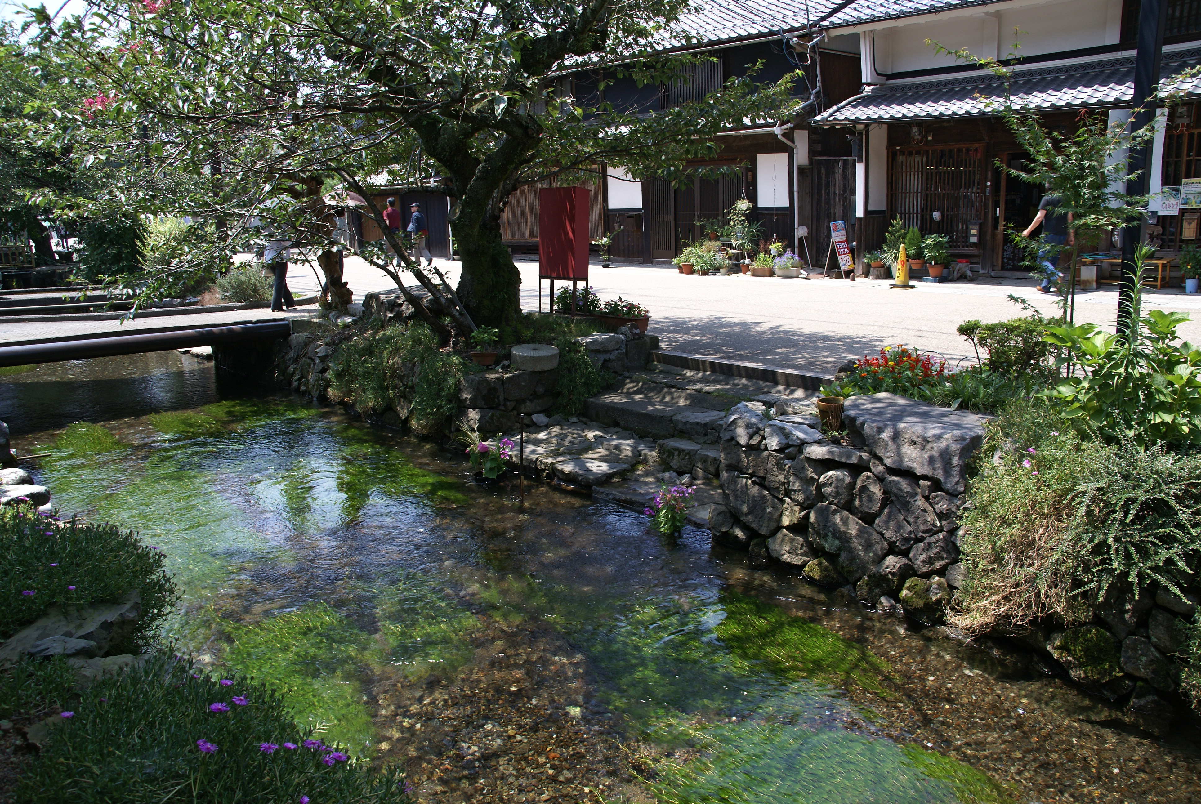 Samegai-juku in Maibara, Shiga prefecture, Japan